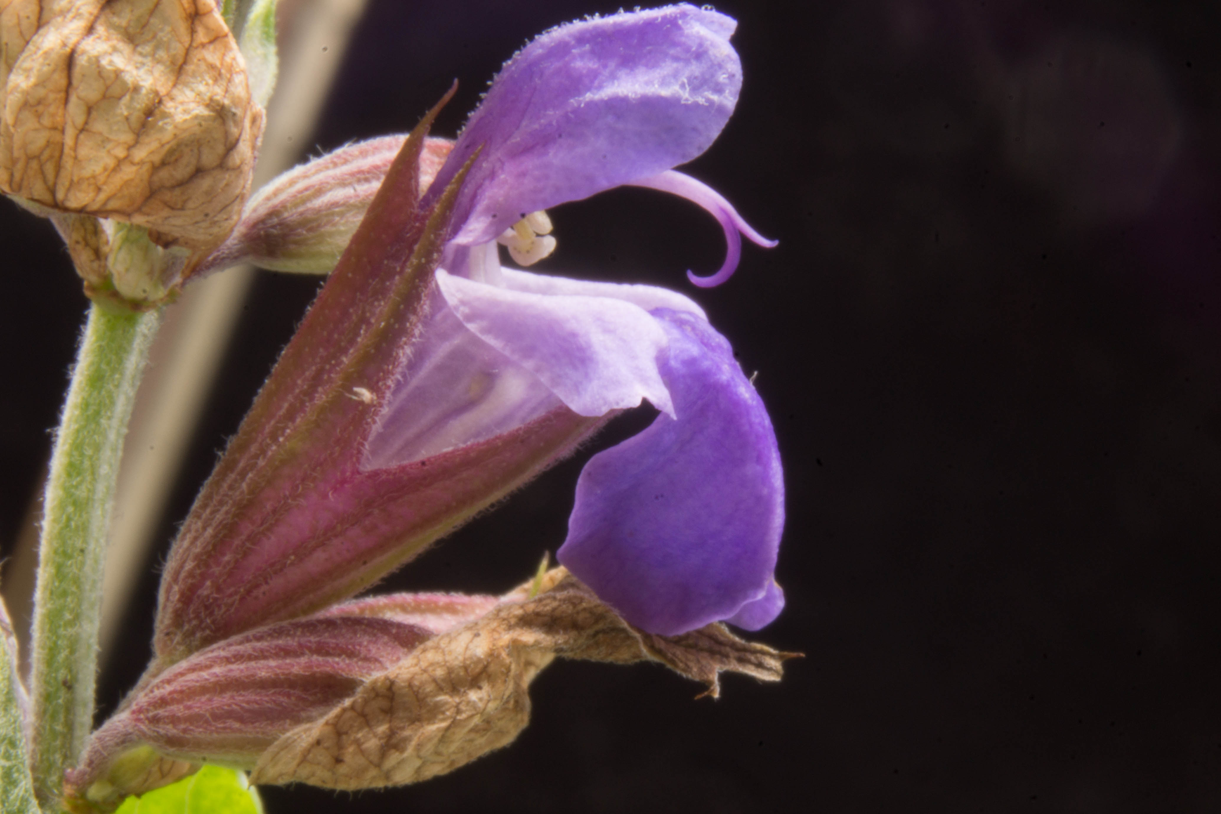 Sage